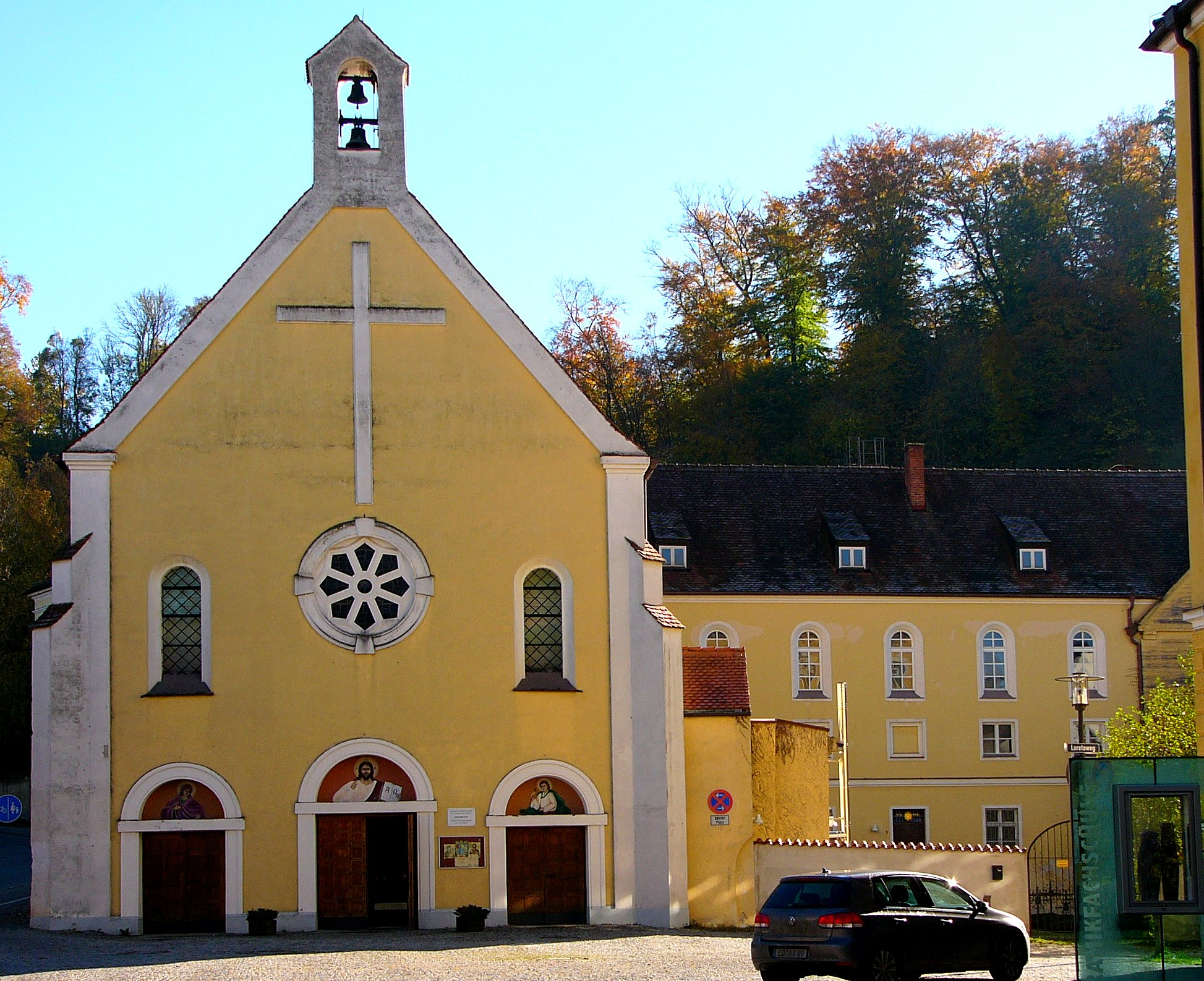 Ehem. Franziskanerkloster mit Kirche; wiedergegründet 1835; ehem. Klosterkirche unter Einbeziehung der schon 1623 erbauten Lorettokapelle 1840-41 neuromanisch erweitert, 1918 vergrößert und nach 1945 wiederaufgebaut, heute Gotteshaus der rumänisch-orthodoxen Gemeinde St. Johannes der Walache, mit Ausstattung; Konventbauten und Brauhaus, dreigeschossig, um 1840; mit Ausstattung; Tertiariats-Ostflügel, Wiederaufbau nach 1945 This is a photograph of an architectural monument.